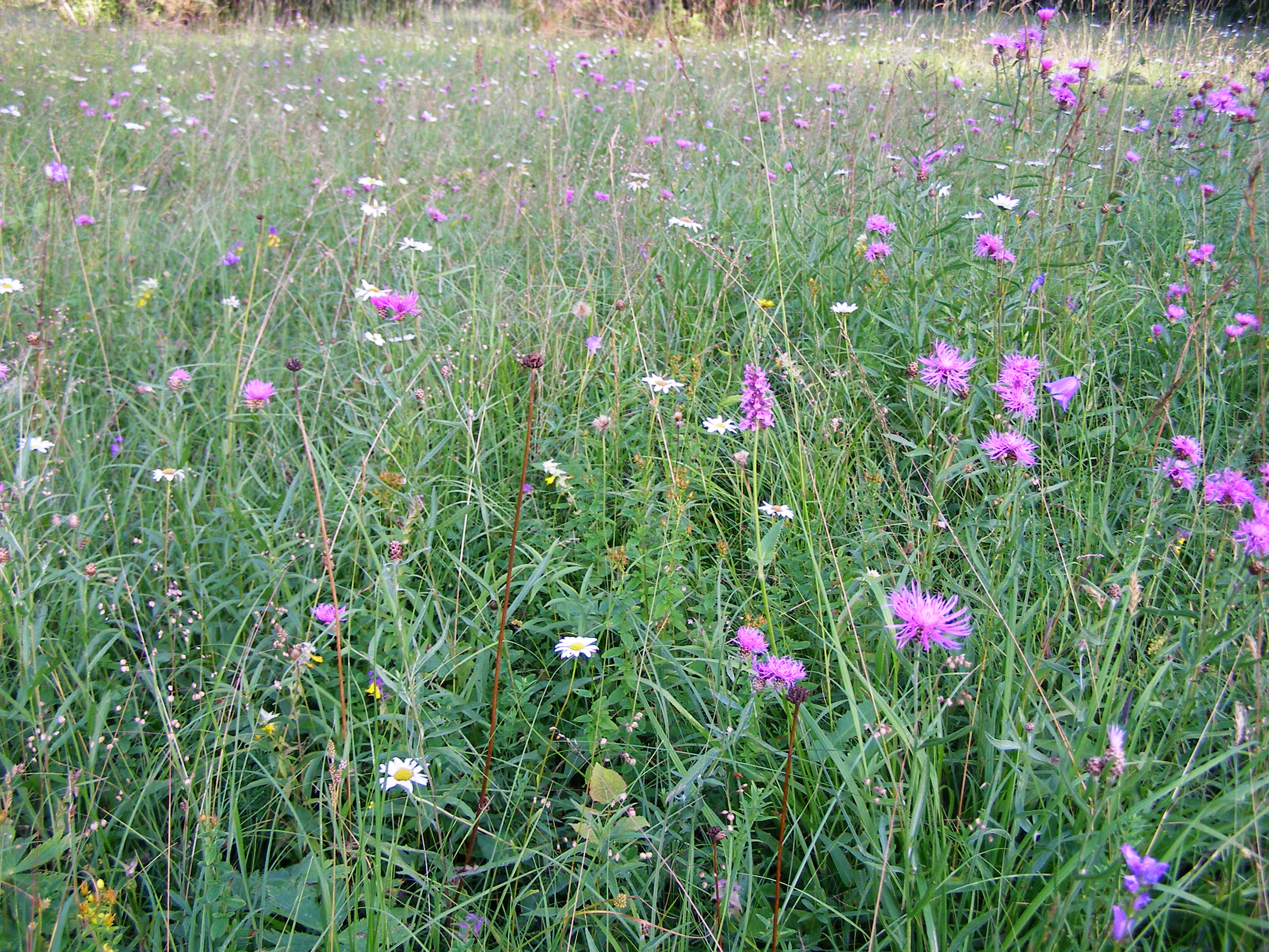 Rohustu Nedrema puisniidul.